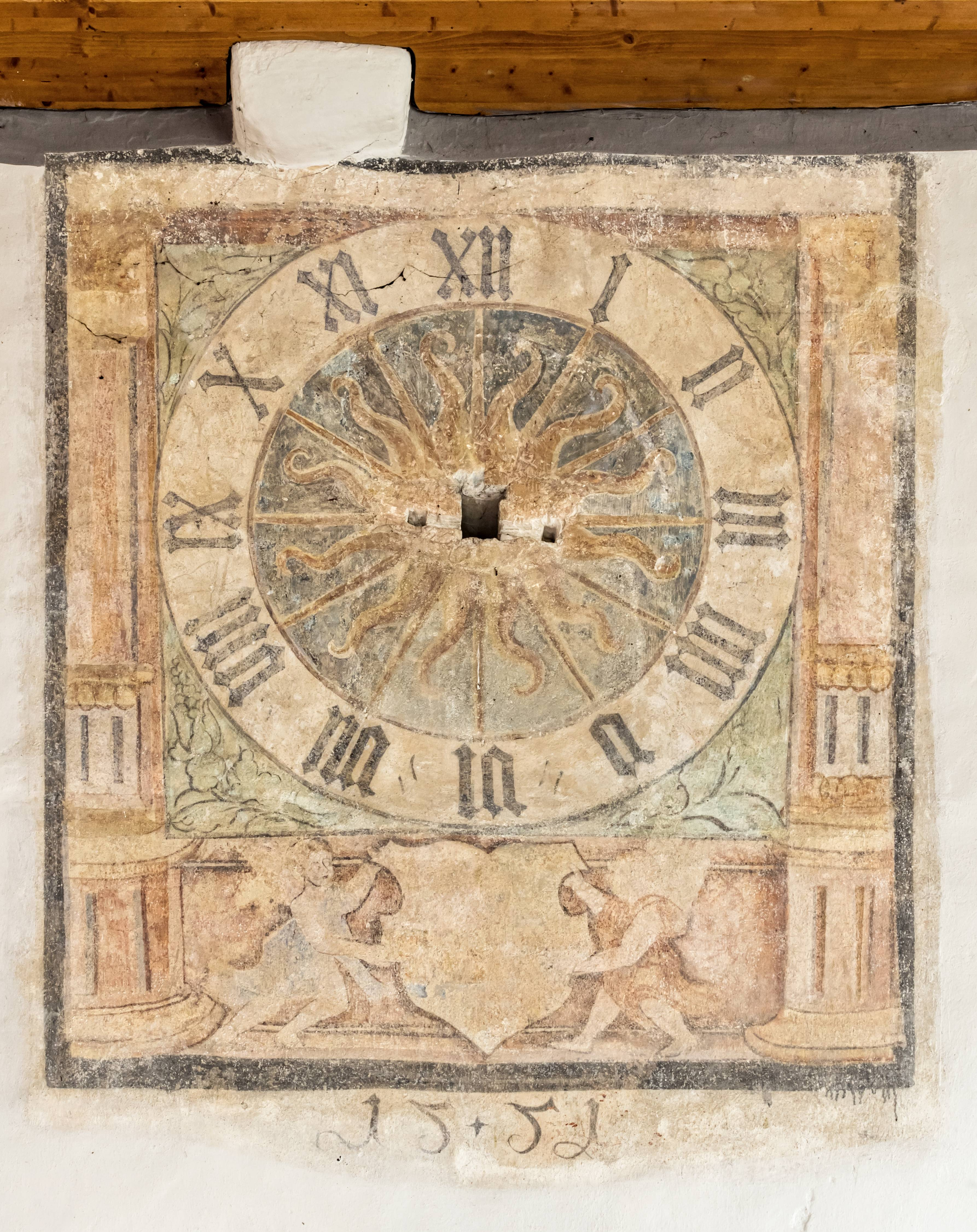 Bilder aus der evangelischen Kirche in Fischingen Der Innenraum mit Fresken aus dem 15. Jahrhundert